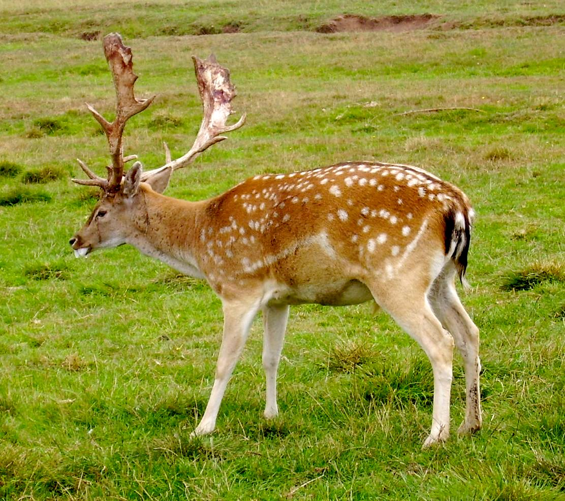 Daniel (Dama dama)